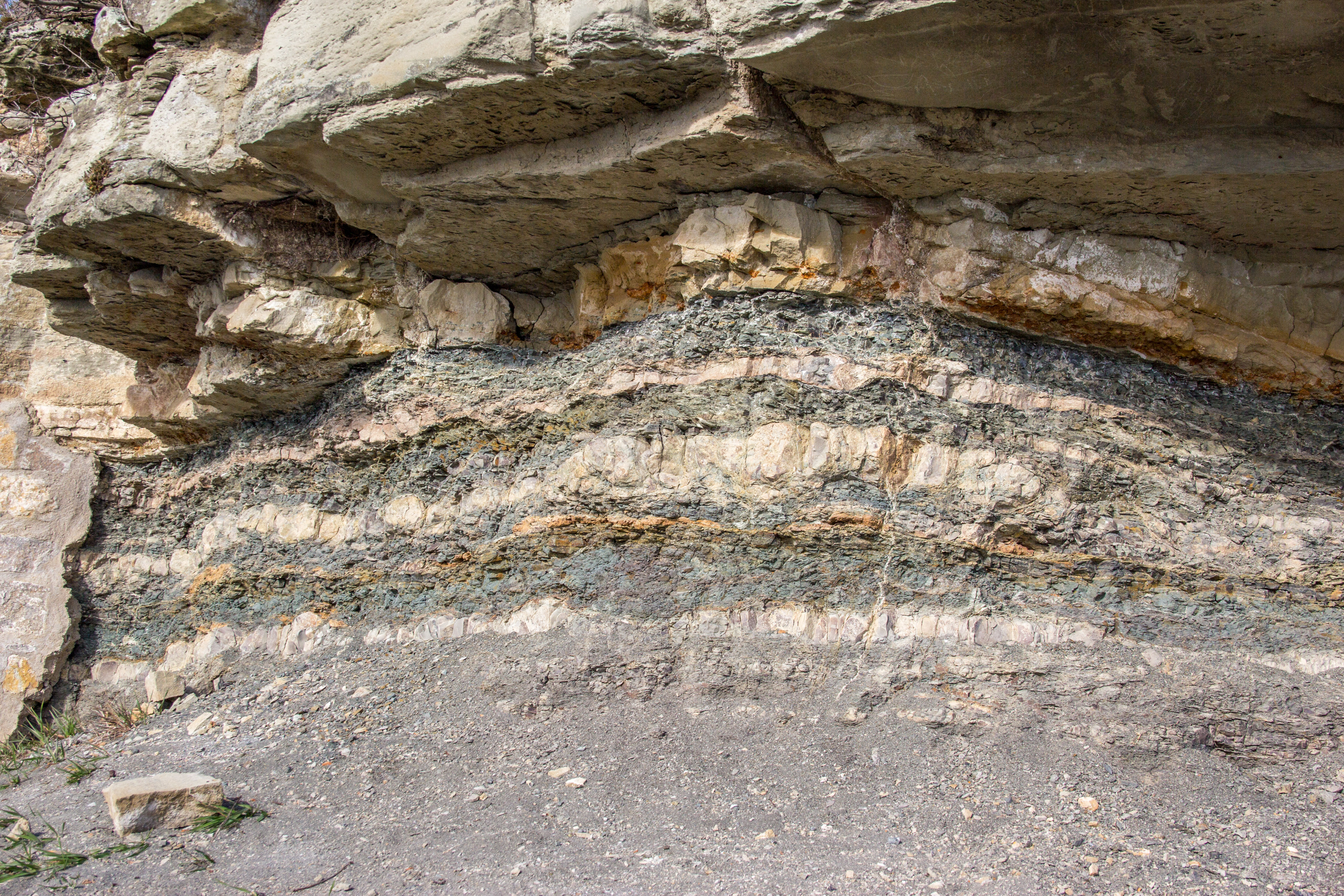 Aufschlüsse, Geotop, Iphofen, Gipskeuper am Schwanberg